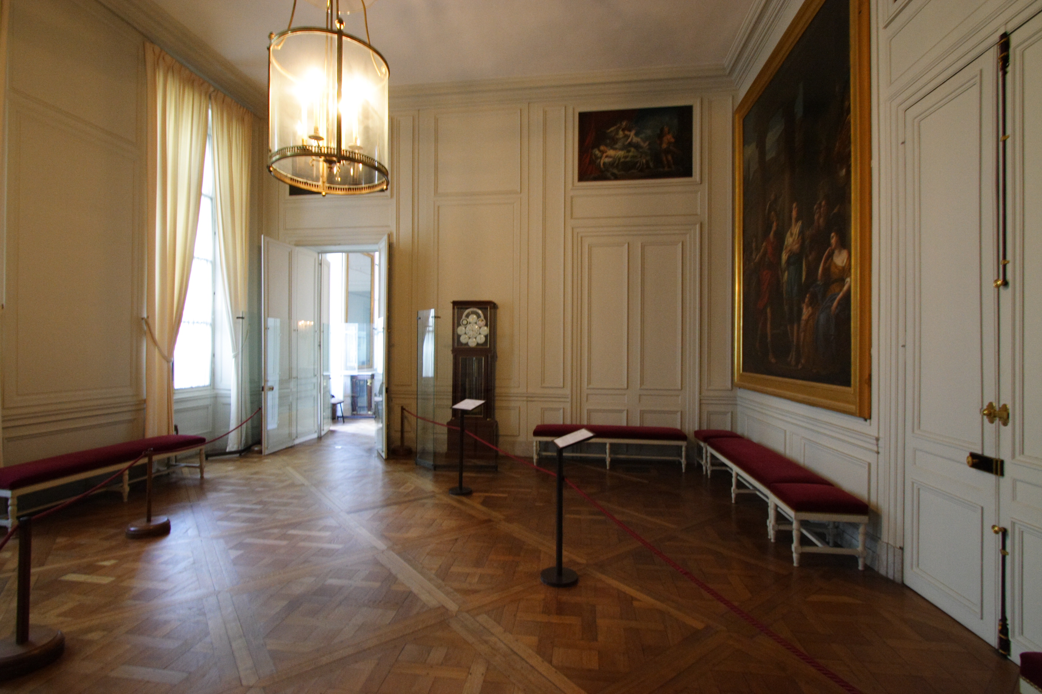 Vorzimmer des Kaisers im Schloss Fontainebleau